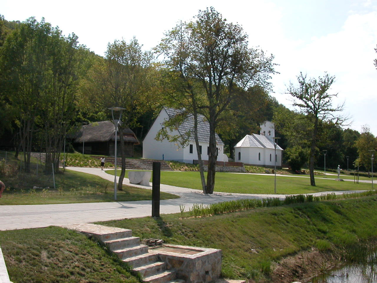 Nikola Tesla´s Geburtshaus im Dorf Smiljan